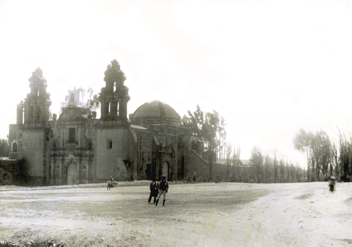 Año 1920, Iglesia La Recoleta. Foto perteneciente a la serie 'Cajamarca Tradicional', de la galería fotográfica de la web de la Municipalidad de Cajamarca Perú.